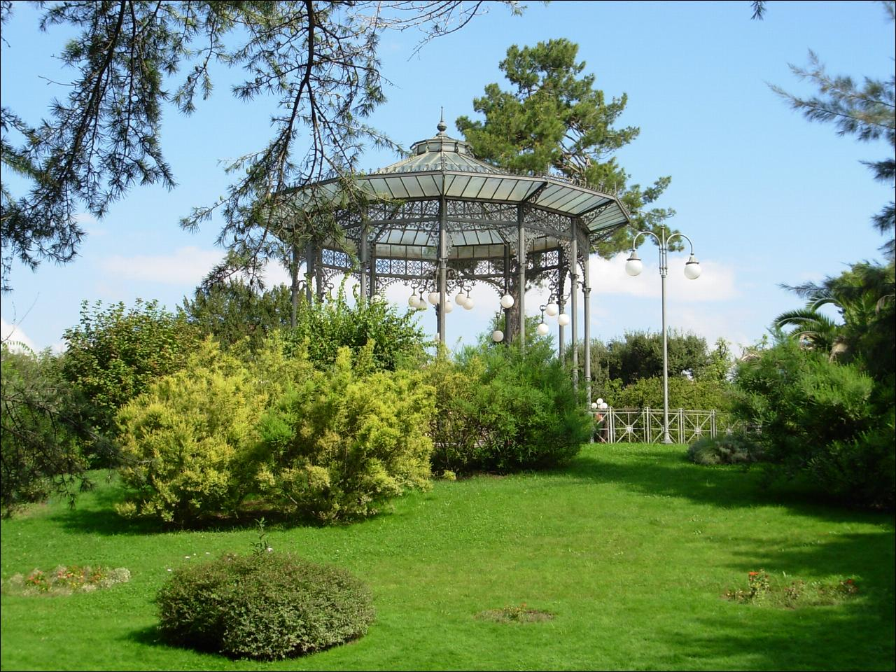 Benevento, Municipal garden